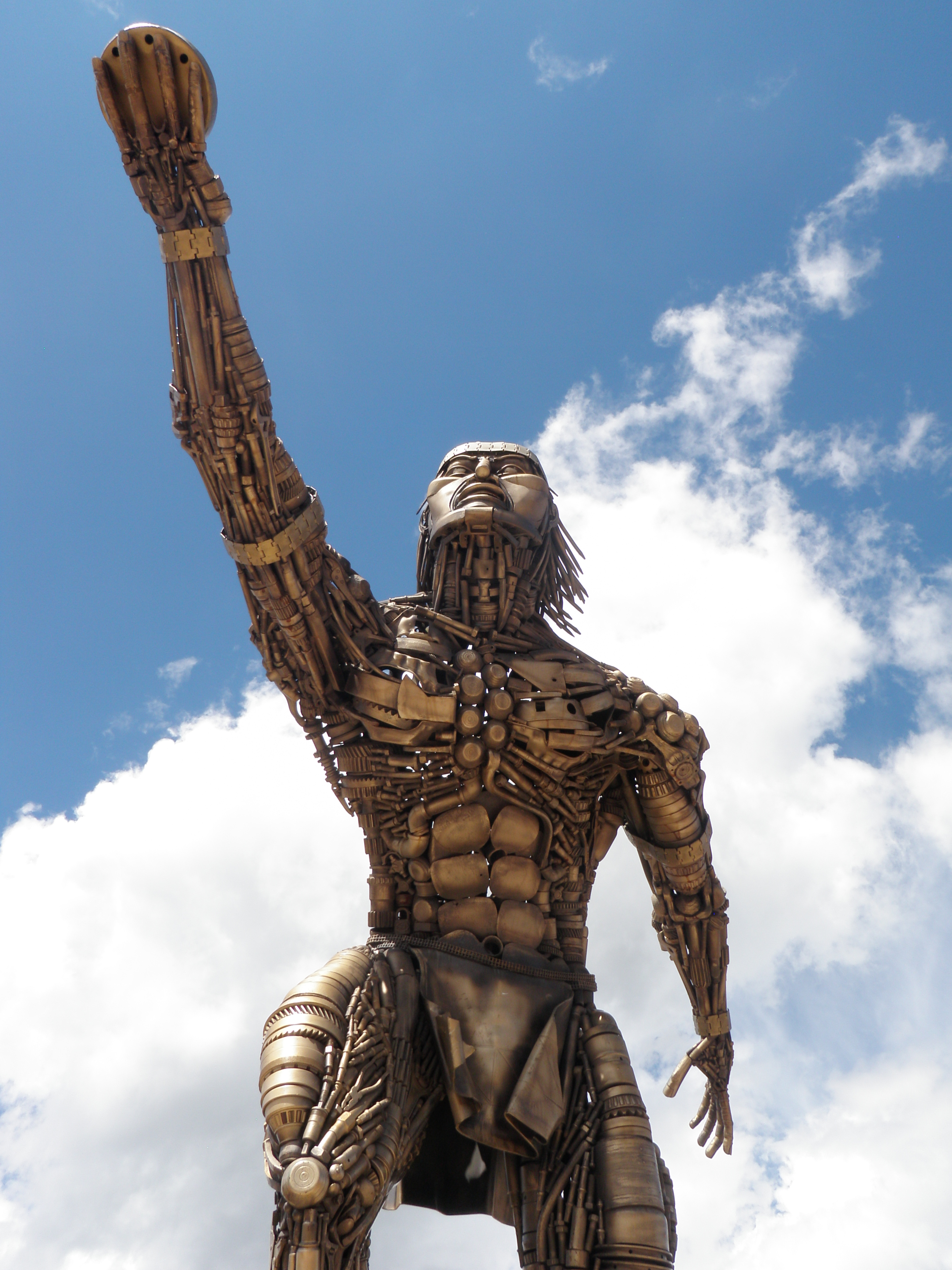 Sector Urbano del Municipio de Turmequé